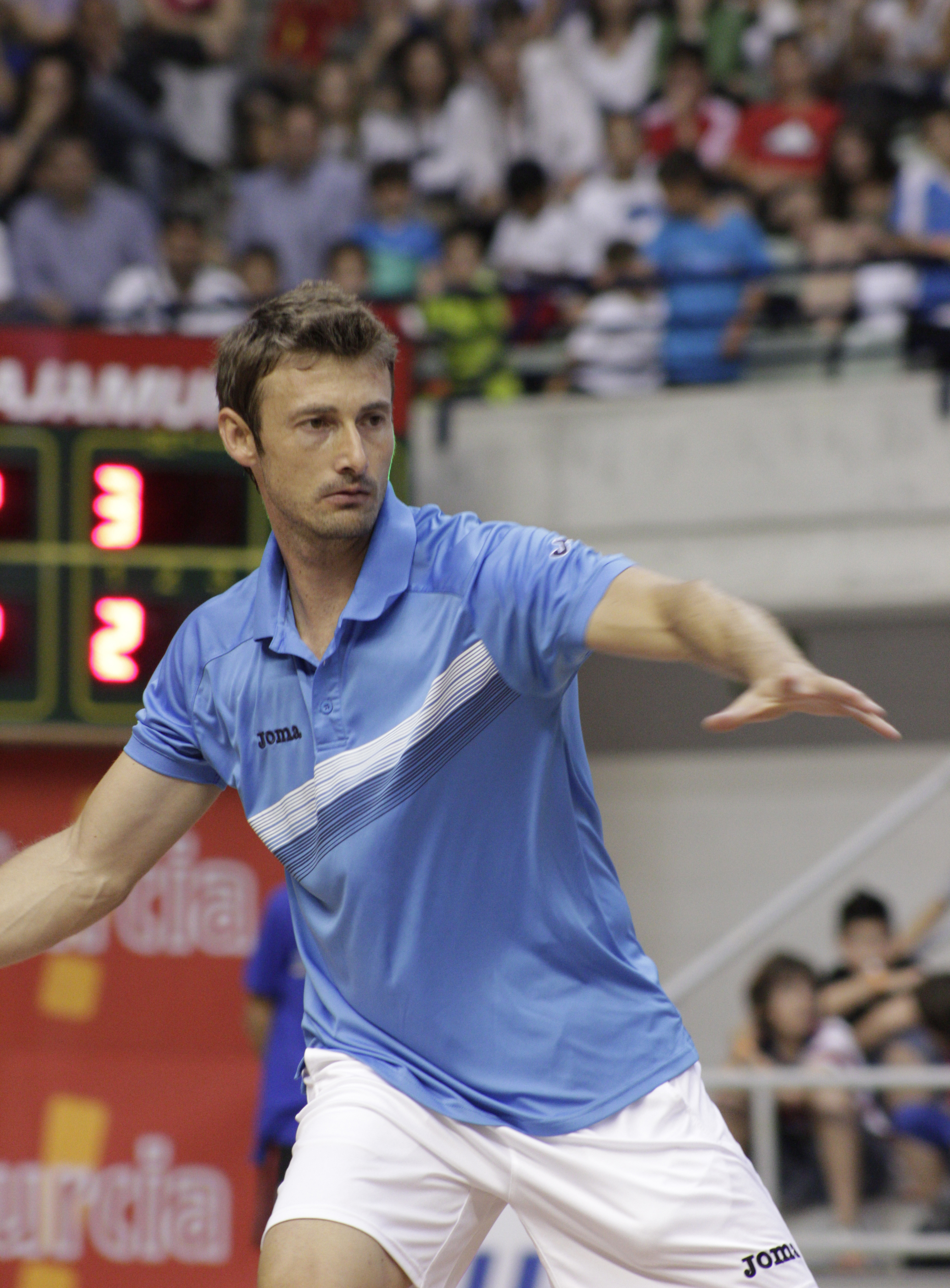 Almagro - Ferrero Partido en beneficio de los damnificados por el terremoto en Lorca